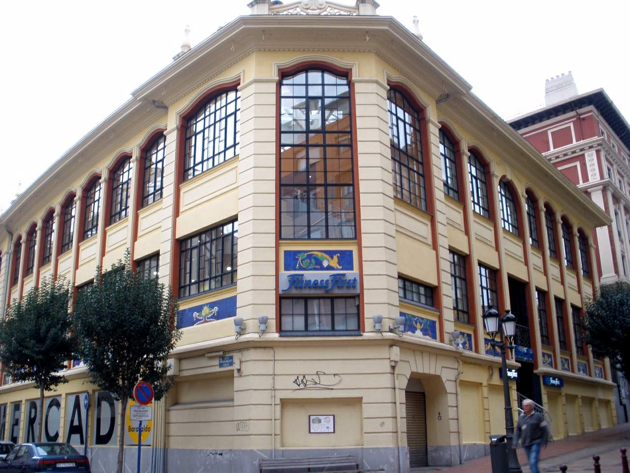 Mercado de Abastos de Barakaldo